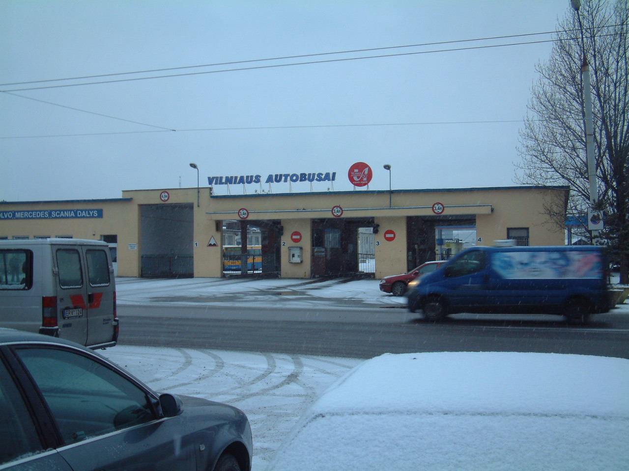 Vilniaus Autobusai